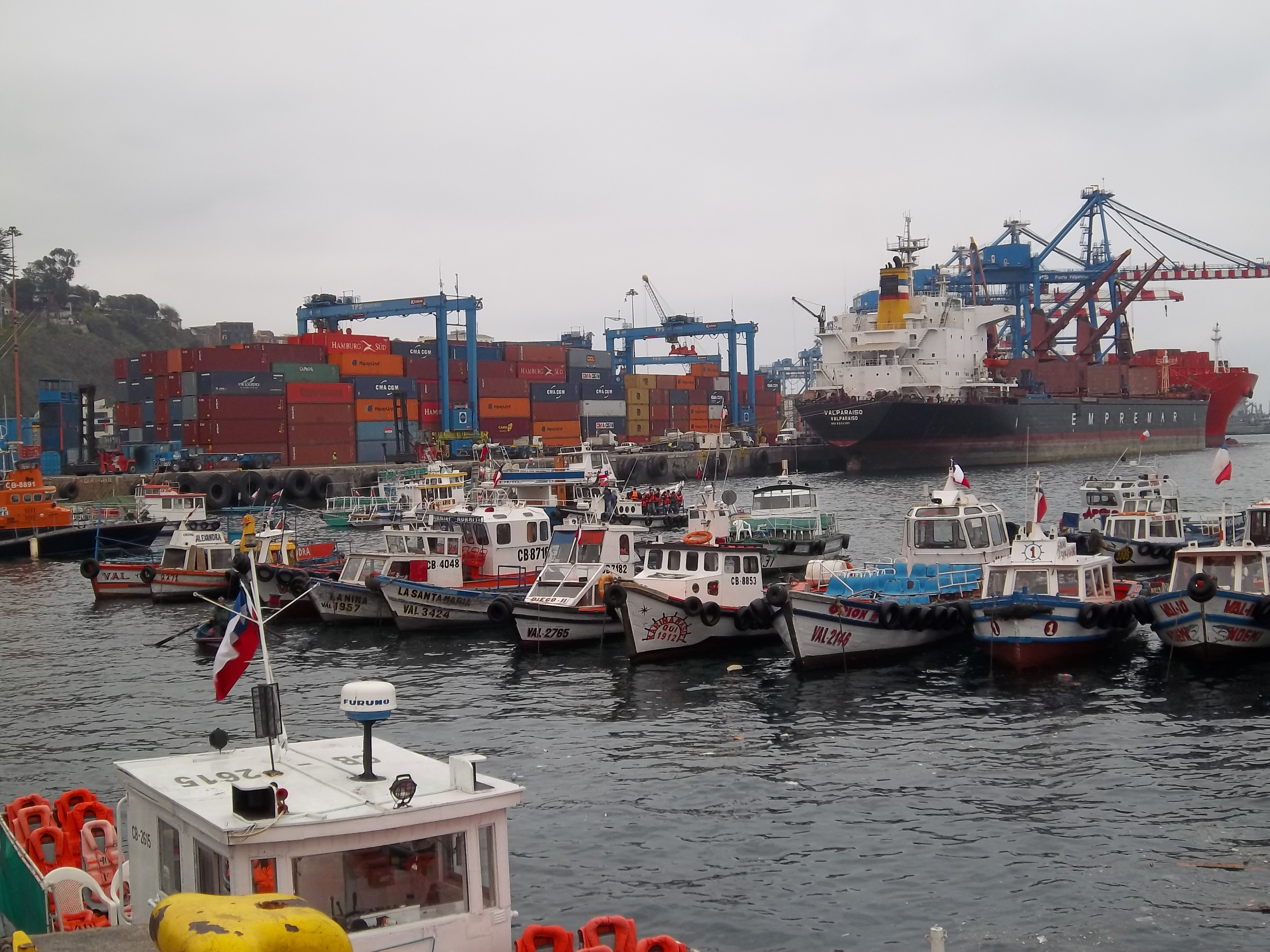 Barcos en el muelle Prat, puerto de Valparaíso, Chile.